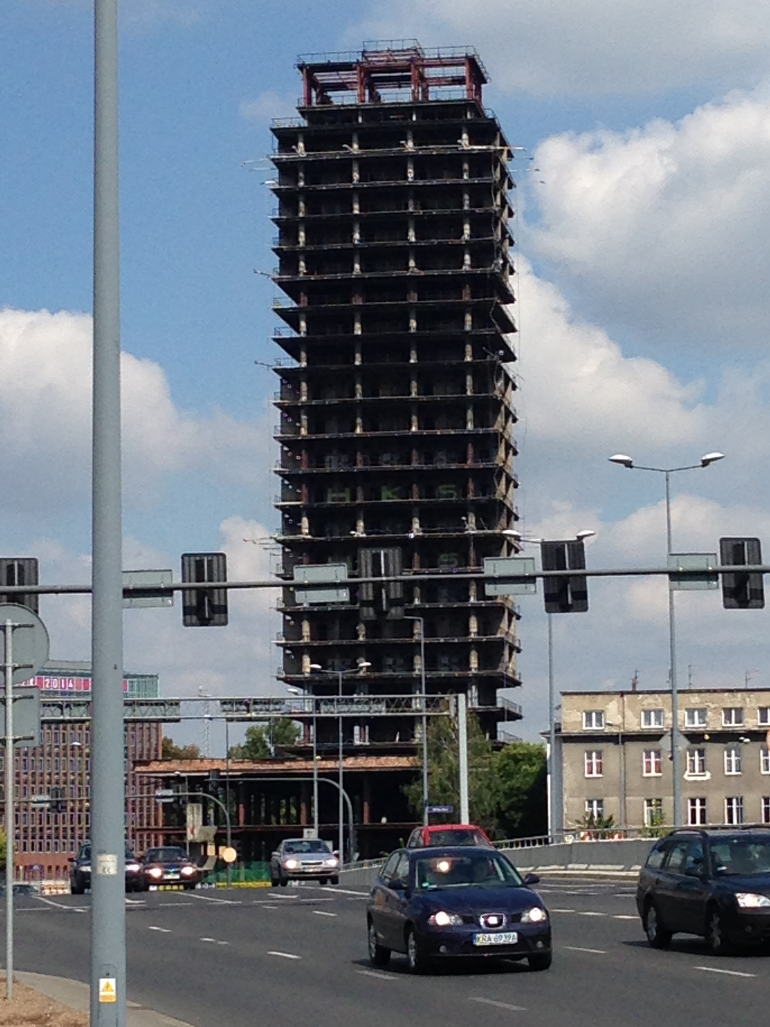 skeletor building in Krakow